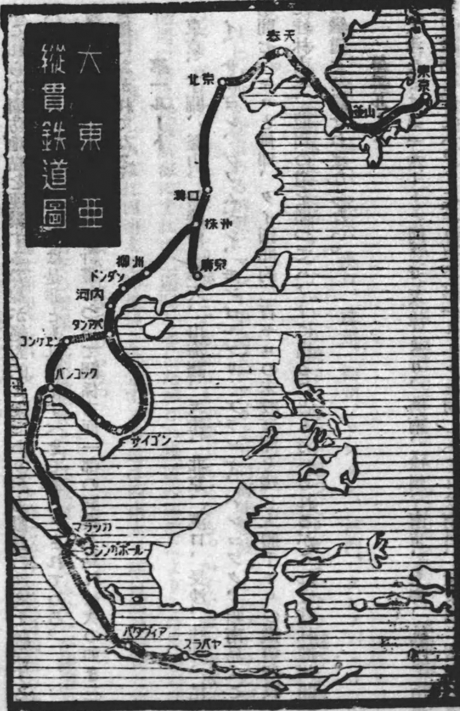 Map of Greater East Asia Railroad, published in 1943.